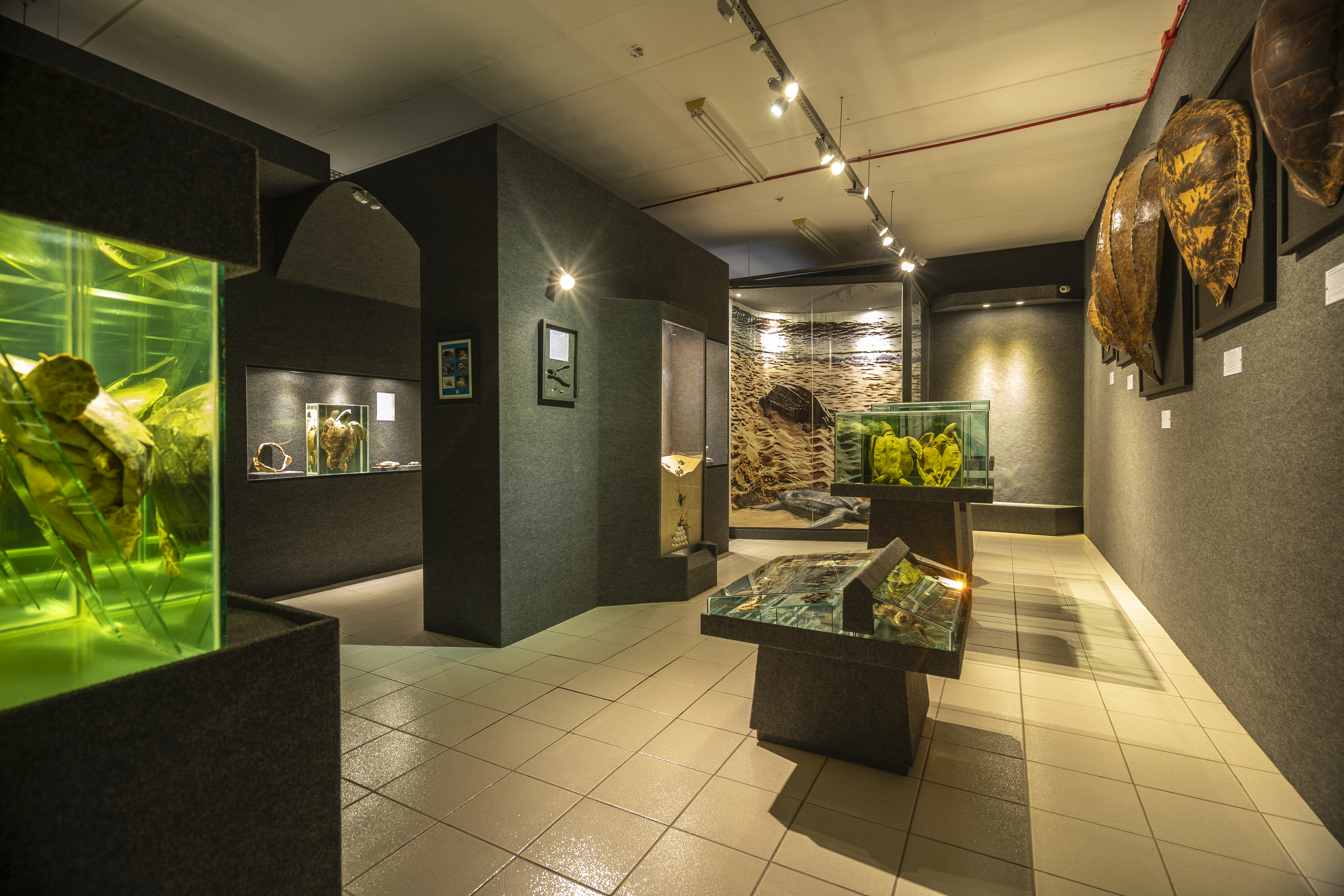 Vista parcial da Ala dos Répteis Marinhos, com destaque para as 5 espécies de tartarugas marinhas que ocorrem no litoral brasileiro